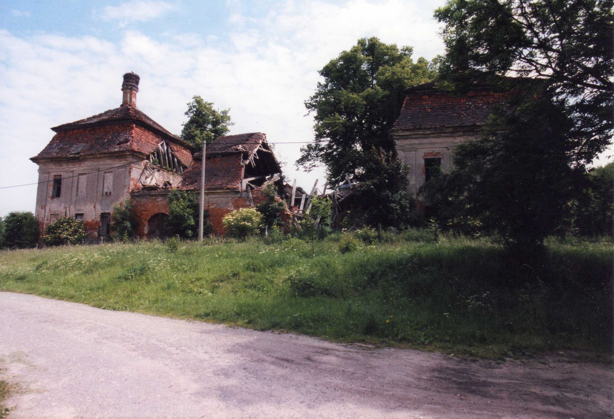 1999 war der Marstall des Gutes Diekhof Kr. Güstrow eingestürzt.